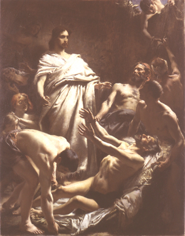 Gaston Thys, Jésus guérit le paralytique, 1889, Paris, Ecole Nationale Supérieure des Beaux-Arts